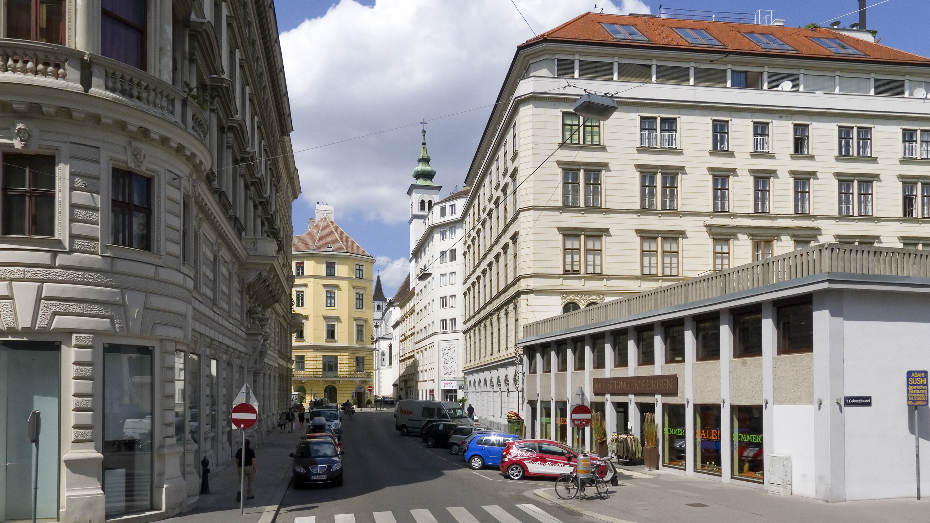 Weihburggasse in Wien 1 bei der Coburgbastei Richtung Nordwesten